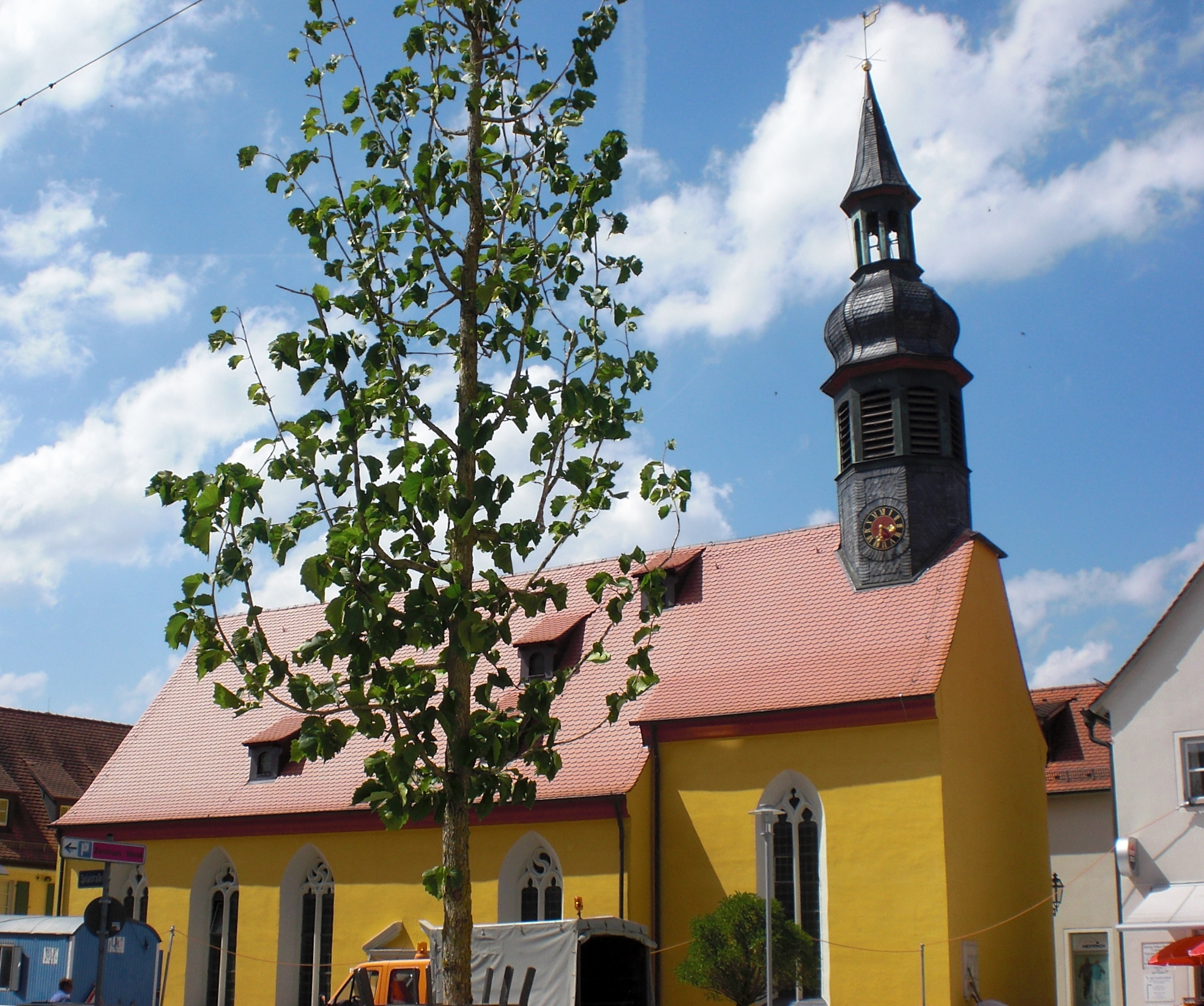 Spitalkirche in Gunzenhausen